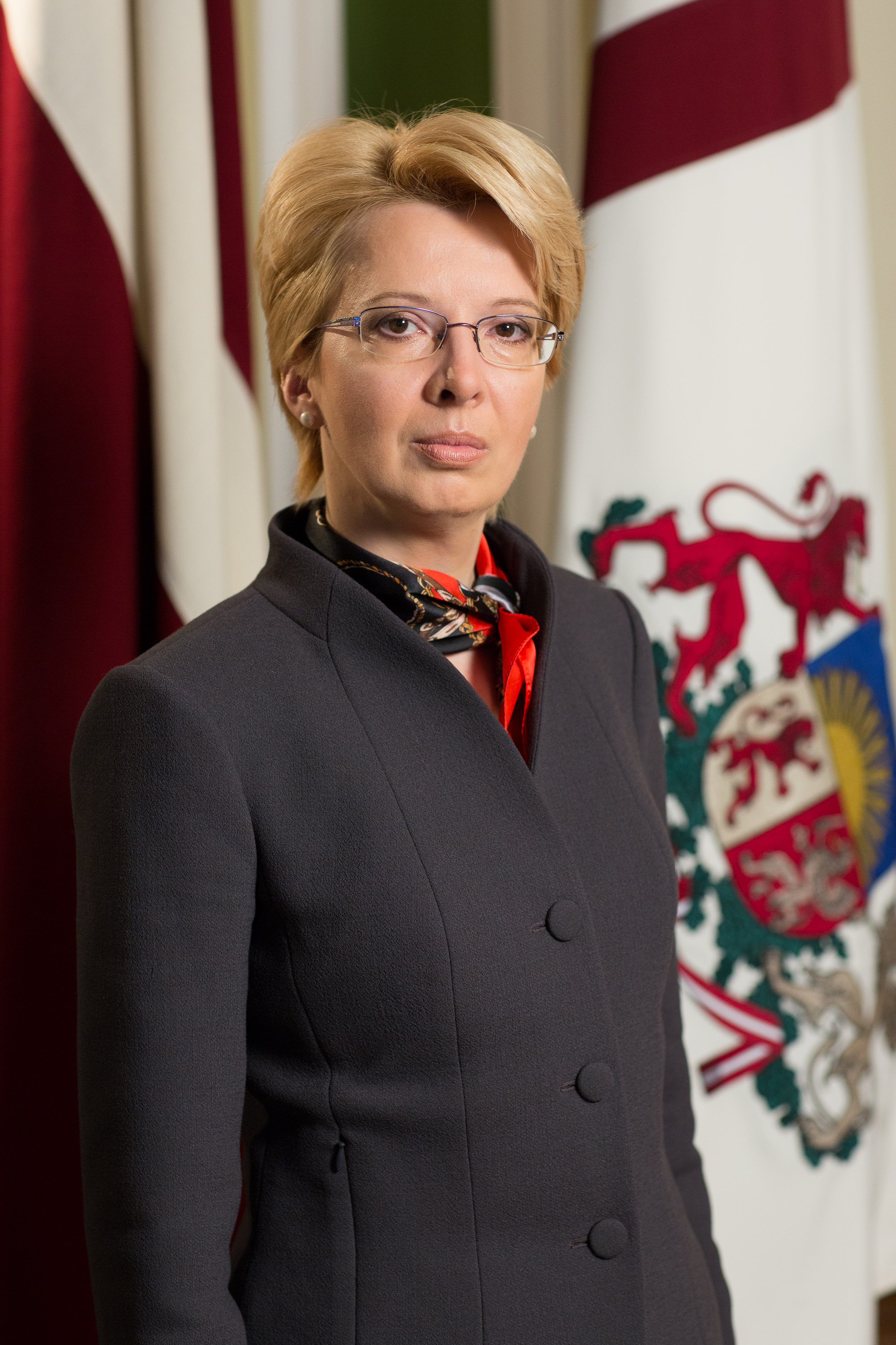 12.Saeimas priekšsēdētāja Ināra Mūrniece. Foto: Ernests Dinka, Saeimas Kanceleja